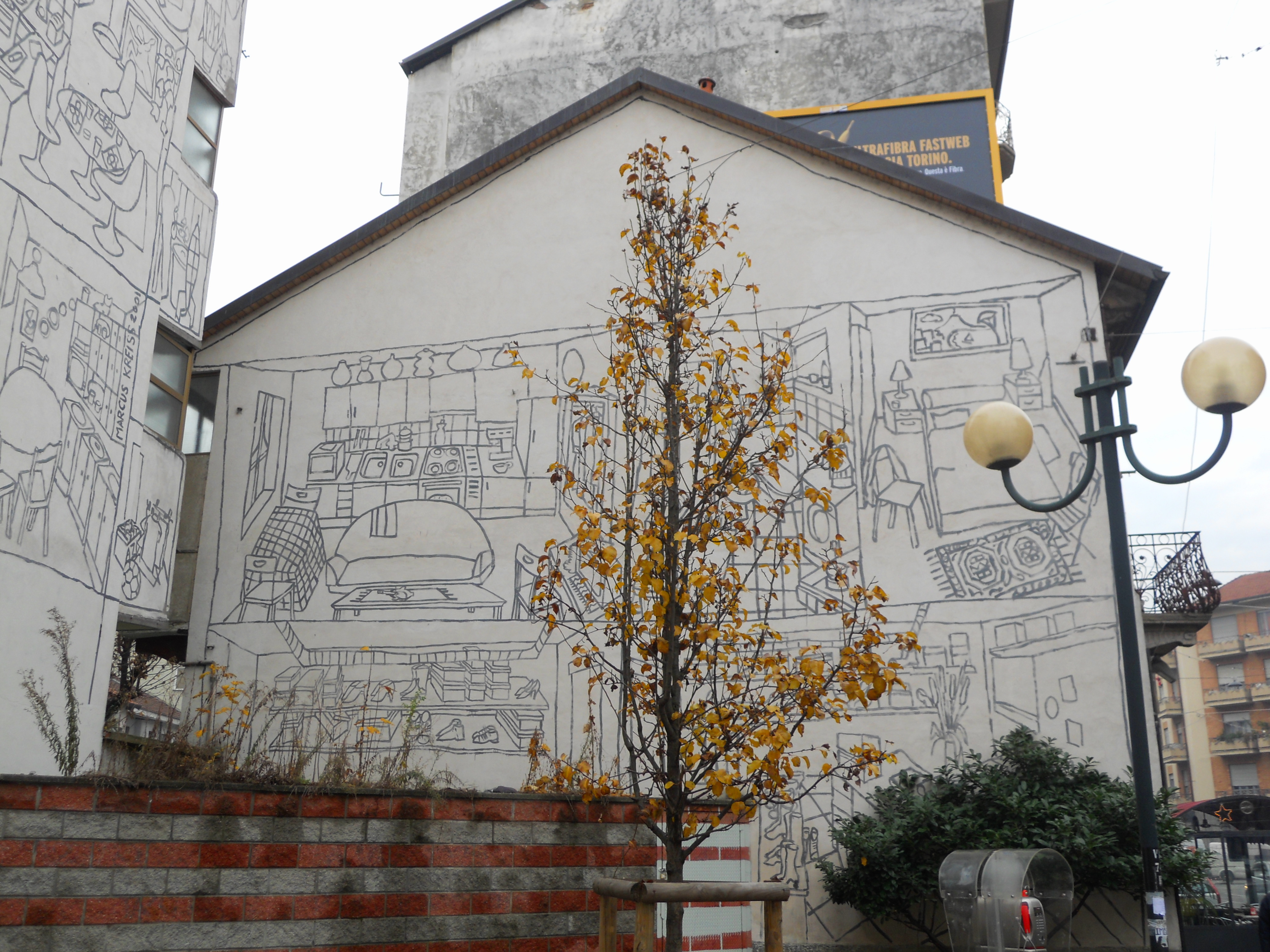 Murales in Corso Vercelli